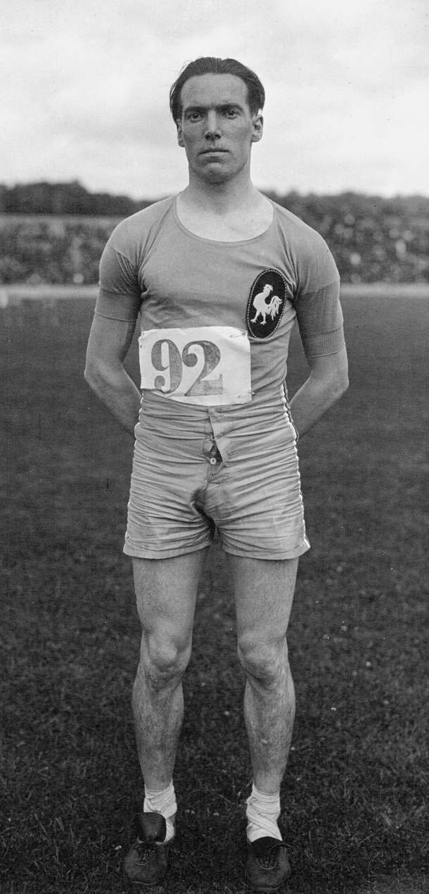 Stade Pershing : match athlétisme France-Angleterre : Wilhem, gagnant du saut en longueur : [photographie de presse] / Agence Meurisse